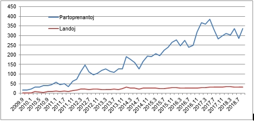 Progreso de nombroj de la Internacia Esperanto-Sumoo partoprenantoj kaj landoj.